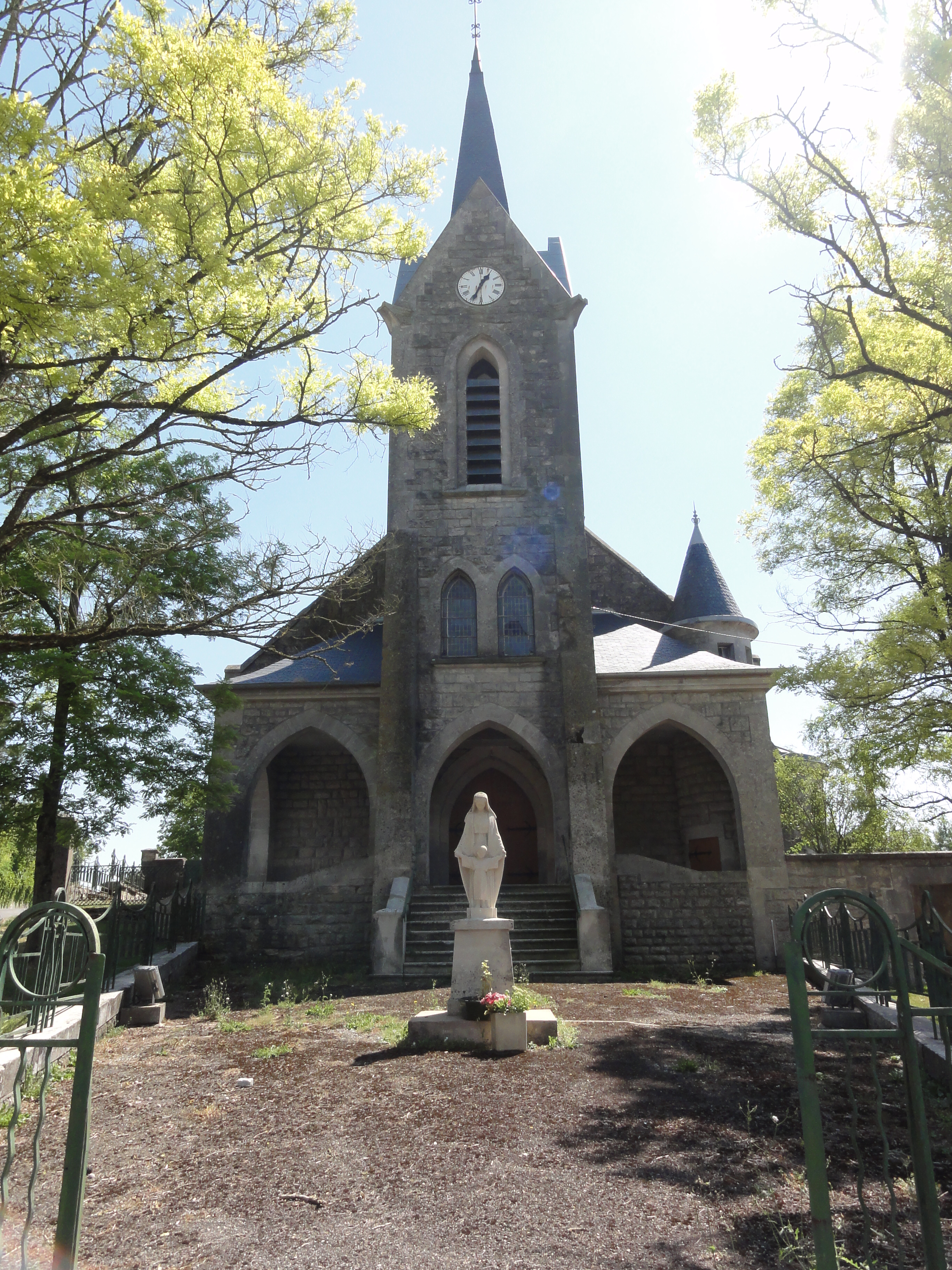 Malancourt (Meuse) église